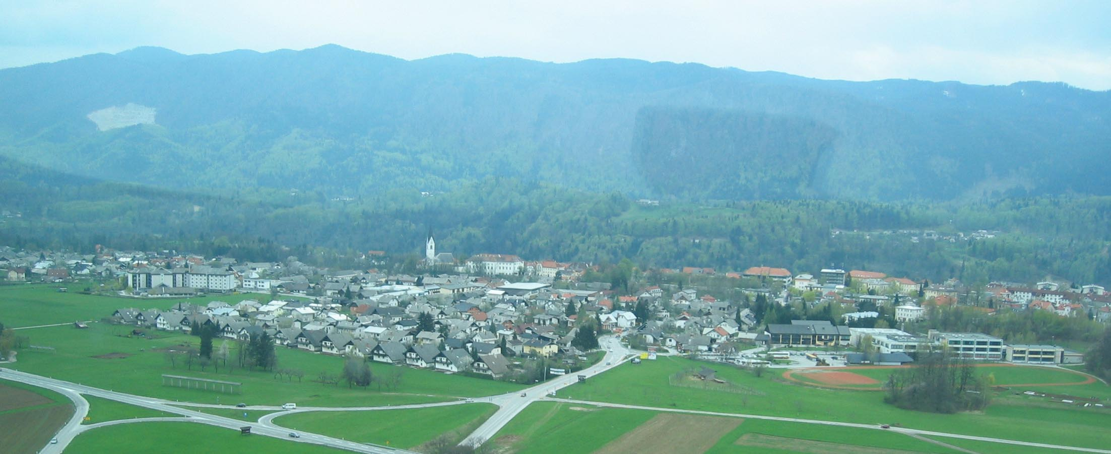 Radovljica, town in Slovenia photo:Ziga 15:10, 26 February 2007 (UTC)